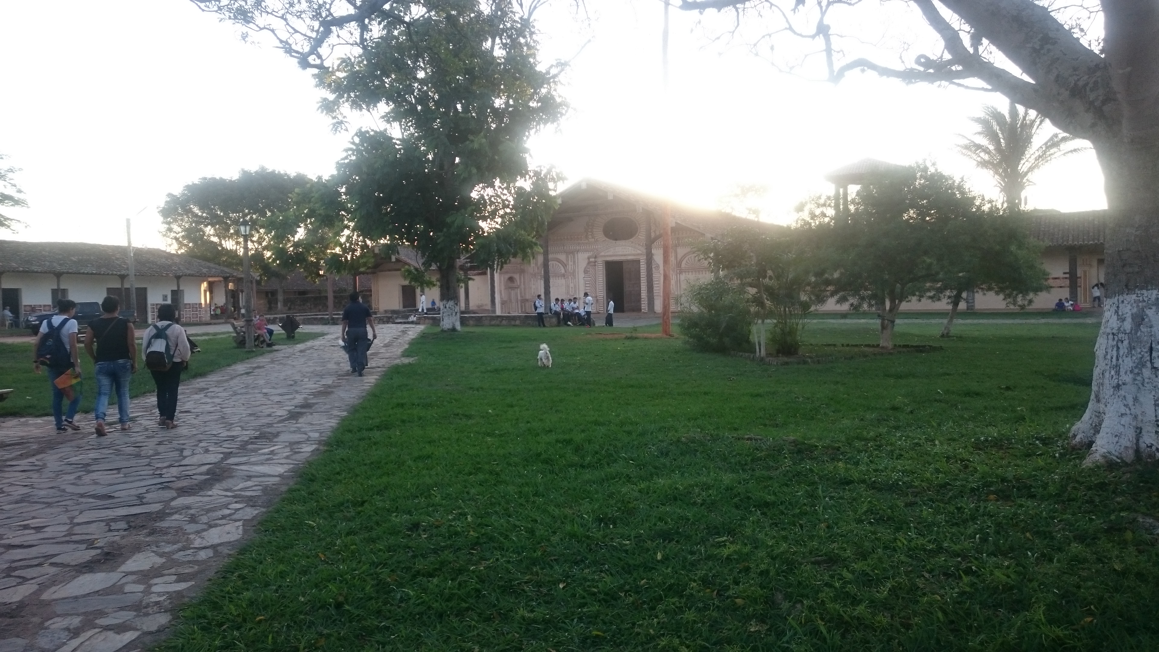 fachada de la iglesia de las Misiones en San Xavier, Santa Cruz